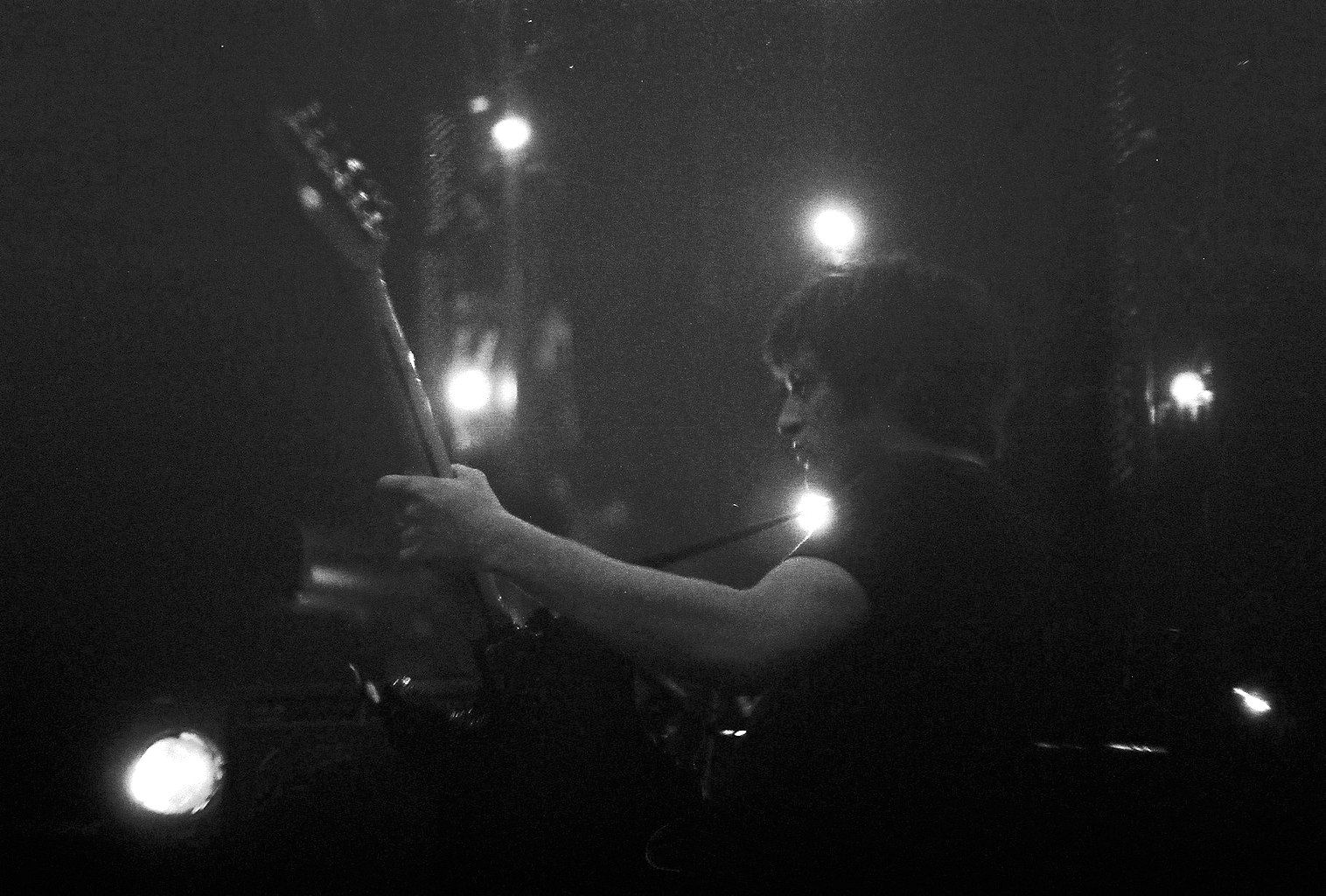 Galaxie au Petit-Champlain (Québec)